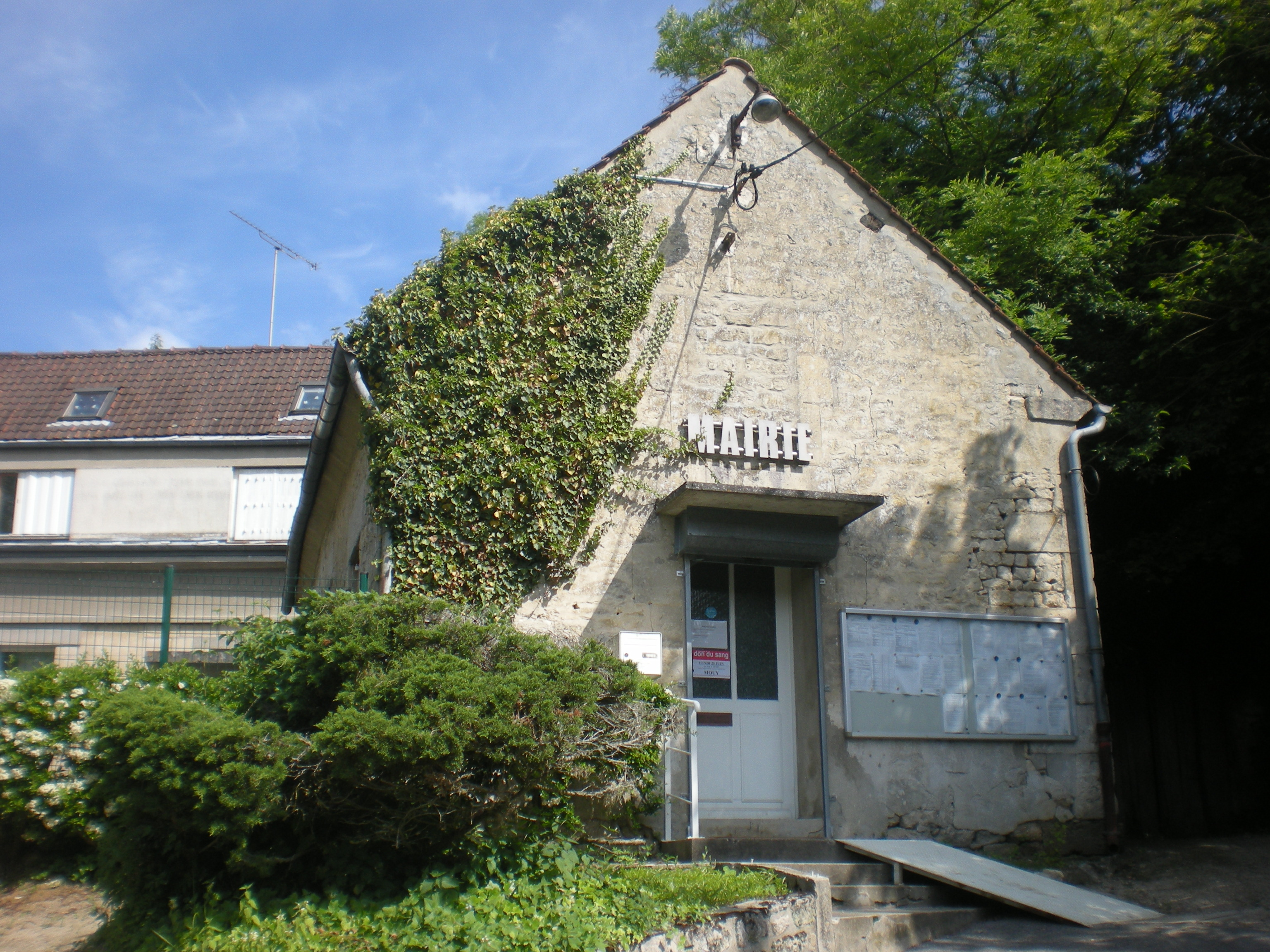 La mairie de Rousseloy